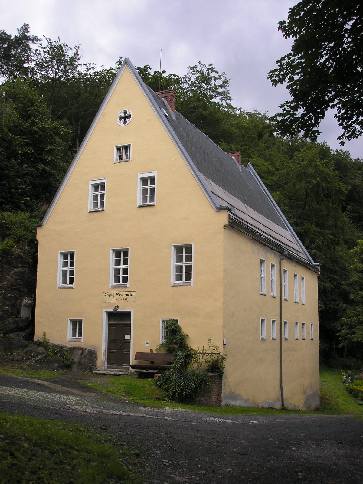 Ein Nebengebäude von Schloss Wespenstein in Gräfenthal (Thüringen).